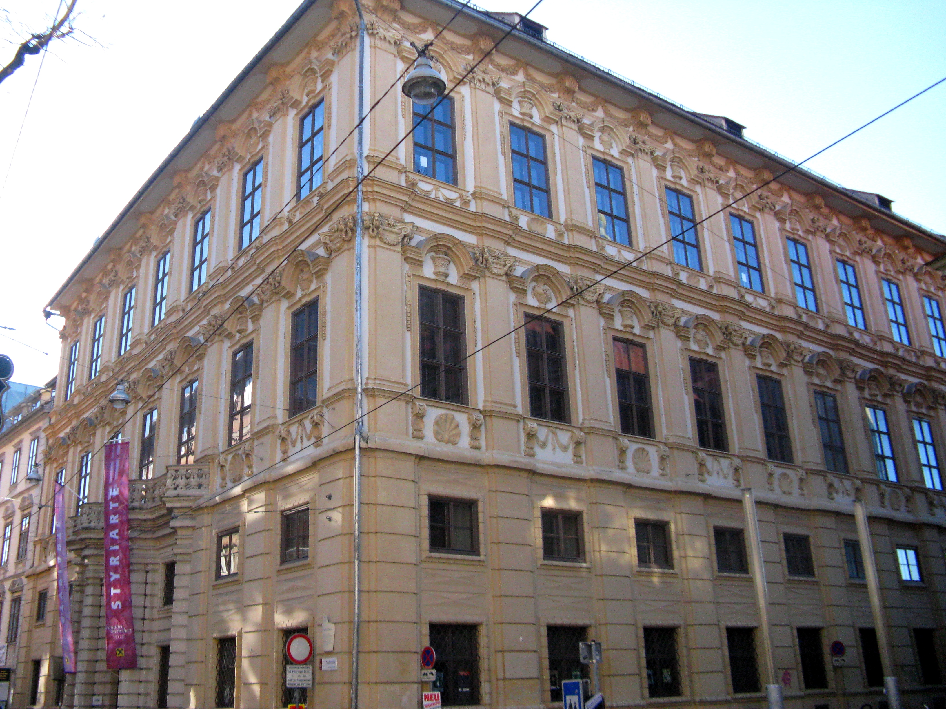 Palais Attems, Sackstraße, Innere Stadt, Graz